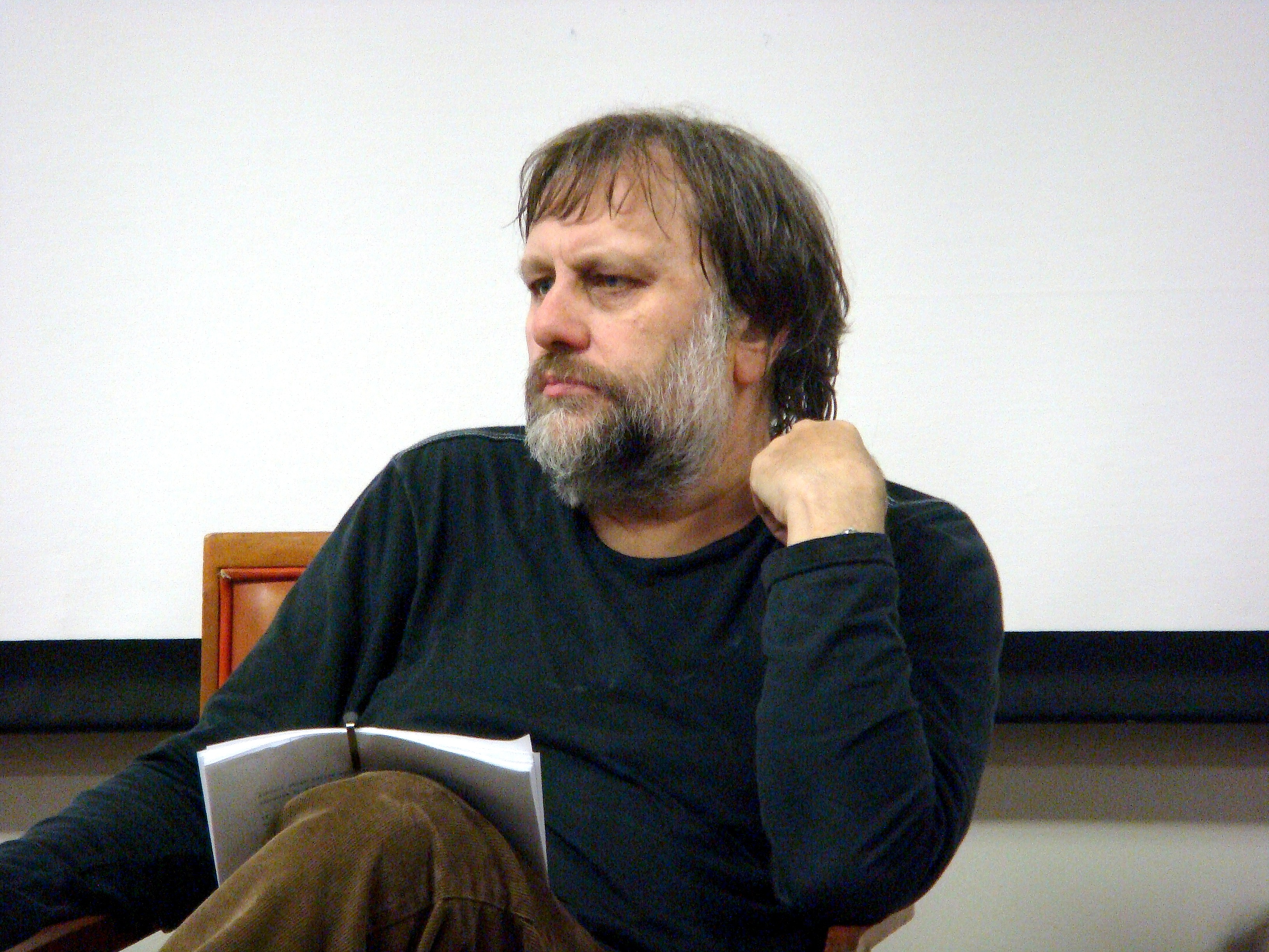 Slovenian philosopher Slavoj Zizek in Liverpool.